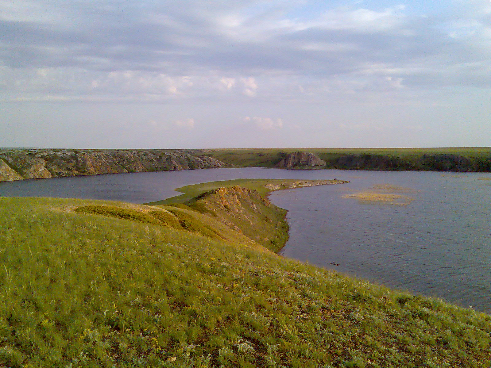 Большая Уртазымка